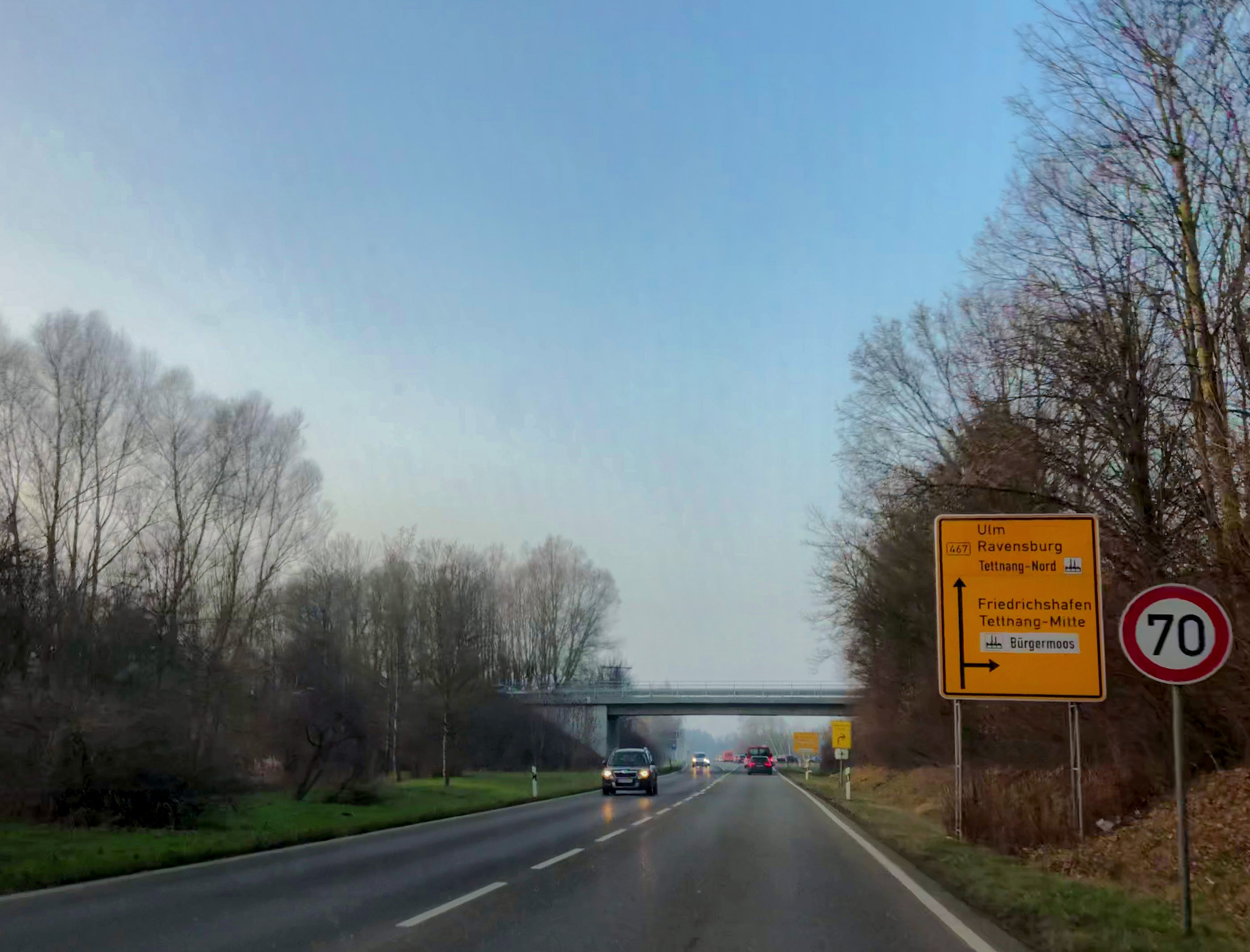 Bundesstraße B 467 bei Knoten Tettnang-Mitte; Richtung Norden